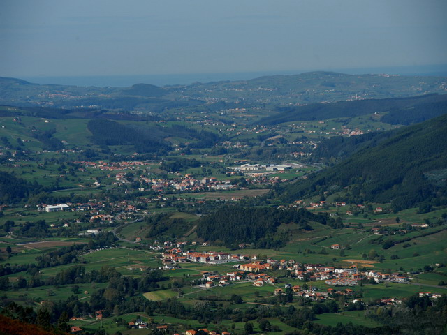 Castañeda © jlgomezlinares